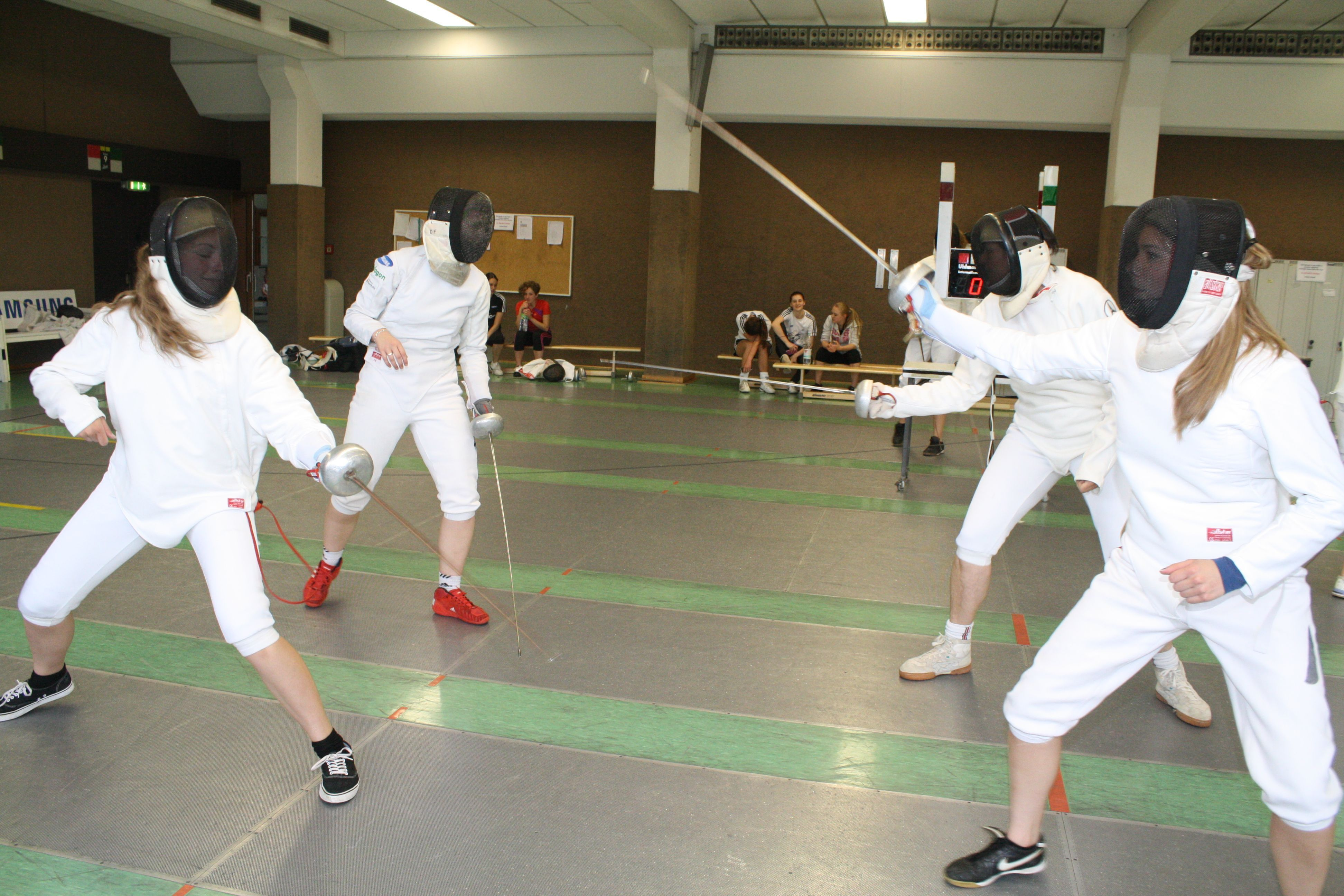 Am 19. April 2013 – dem „Tag der deutschen Sprache in den Niederlanden“ – wurde die Financial T('a)ime von einer niederländischen Schule, dem Martinuscollege in Grootebroek (bei Hoorn am IJsselmeer), eingeladen, um diesen Tag als „Deutsch“-Muttersprachler zu gestalten. Auf dem Bild ist eine Delegation aus den Niederlanden beim Gegenbesuch in Tauberbischofsheim (beim Fechten im Olympiastützpunkt) zu sehen.